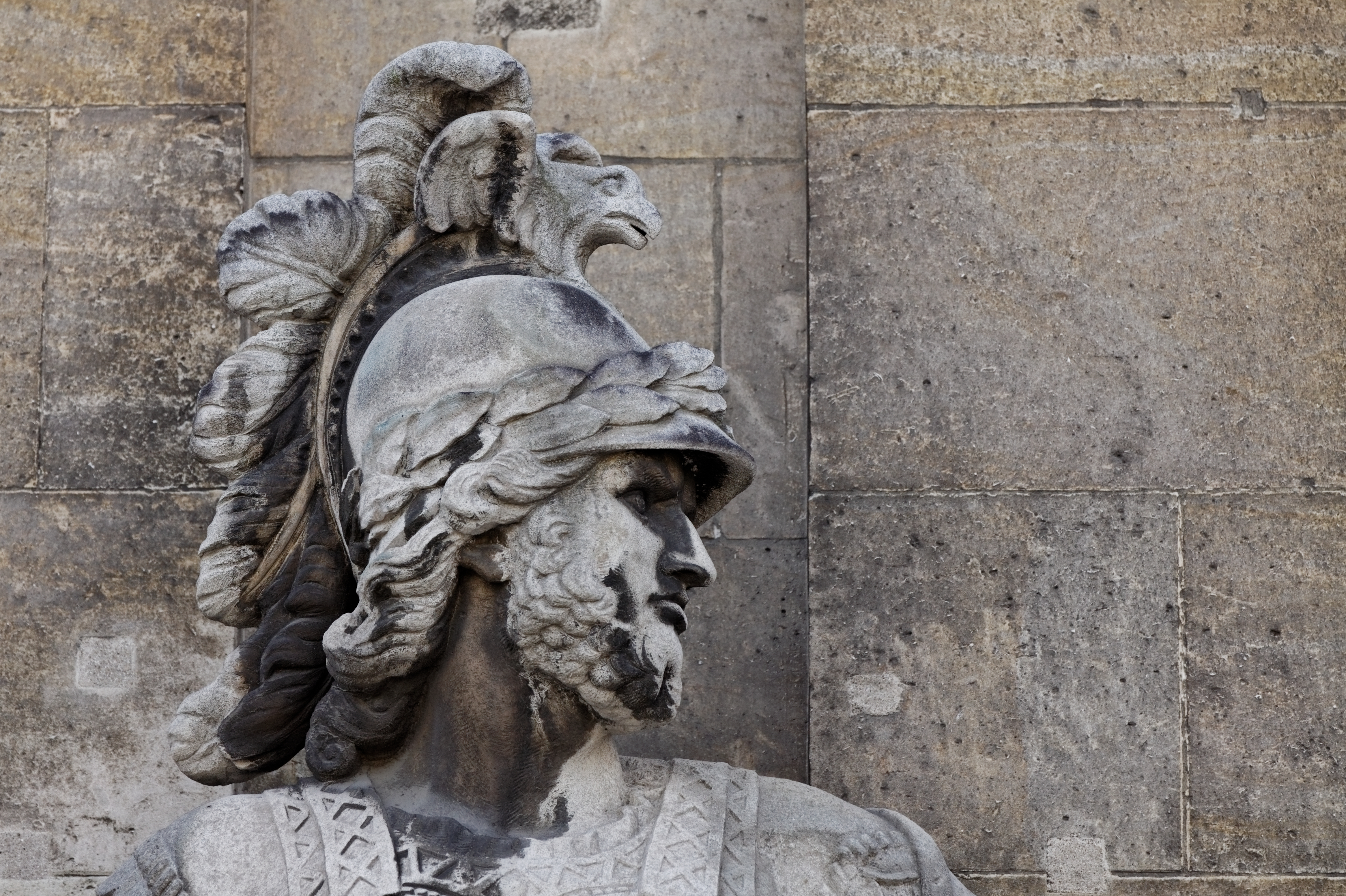 Détail de la statue de Mars à l'entrée nord del'hôtel des Invalides à Paris.